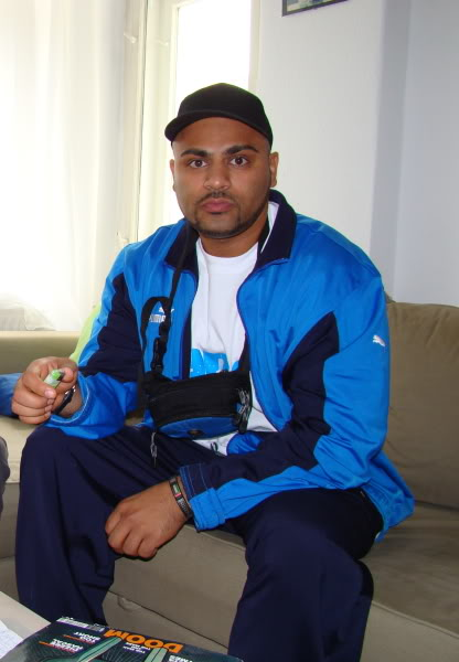 Kaas und Massiv